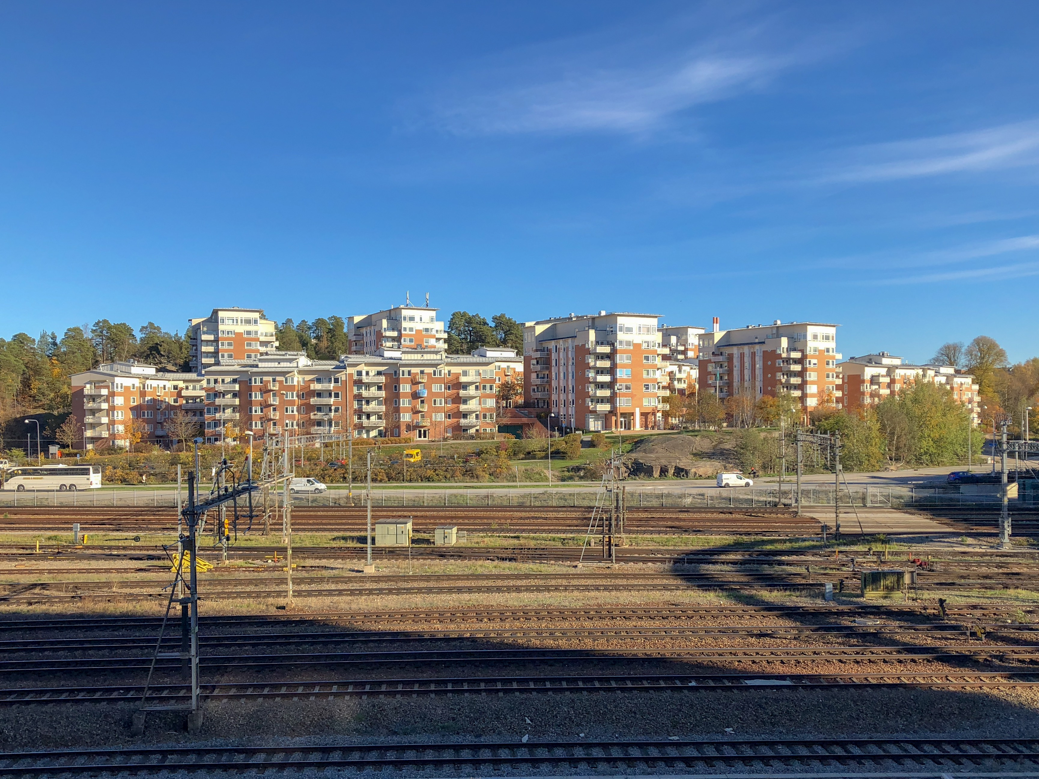 Ballongberget, Solna. Byggnadsår 1991-93. VBB Arkitekter/ Henrik Berg von Linde o Torbjörn Orving Arkitektkontor.